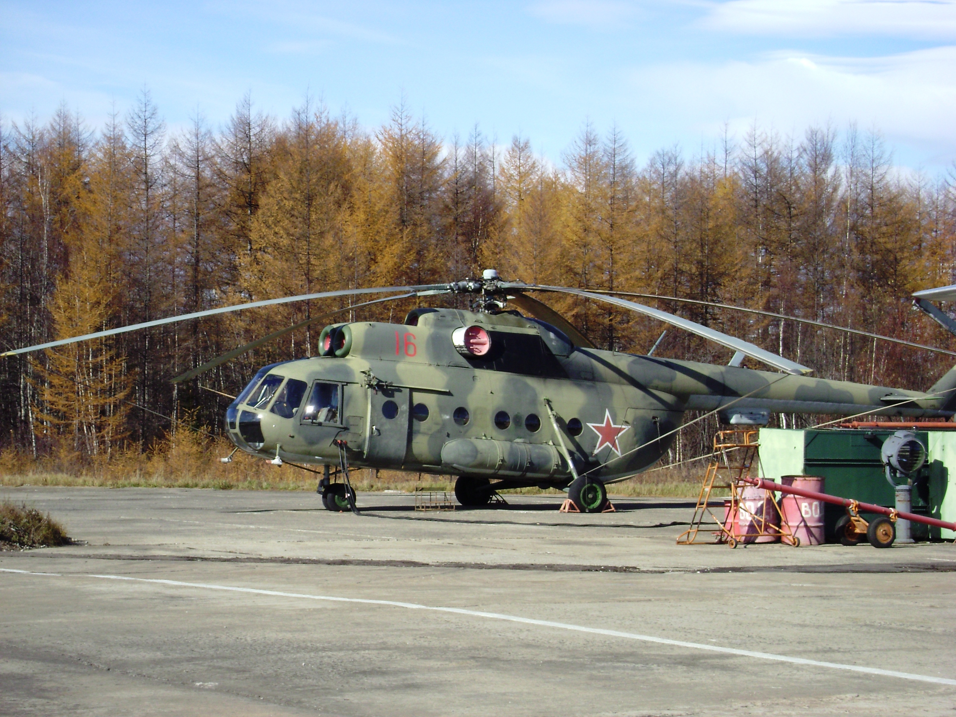 Ми-8Т/б.н. 16